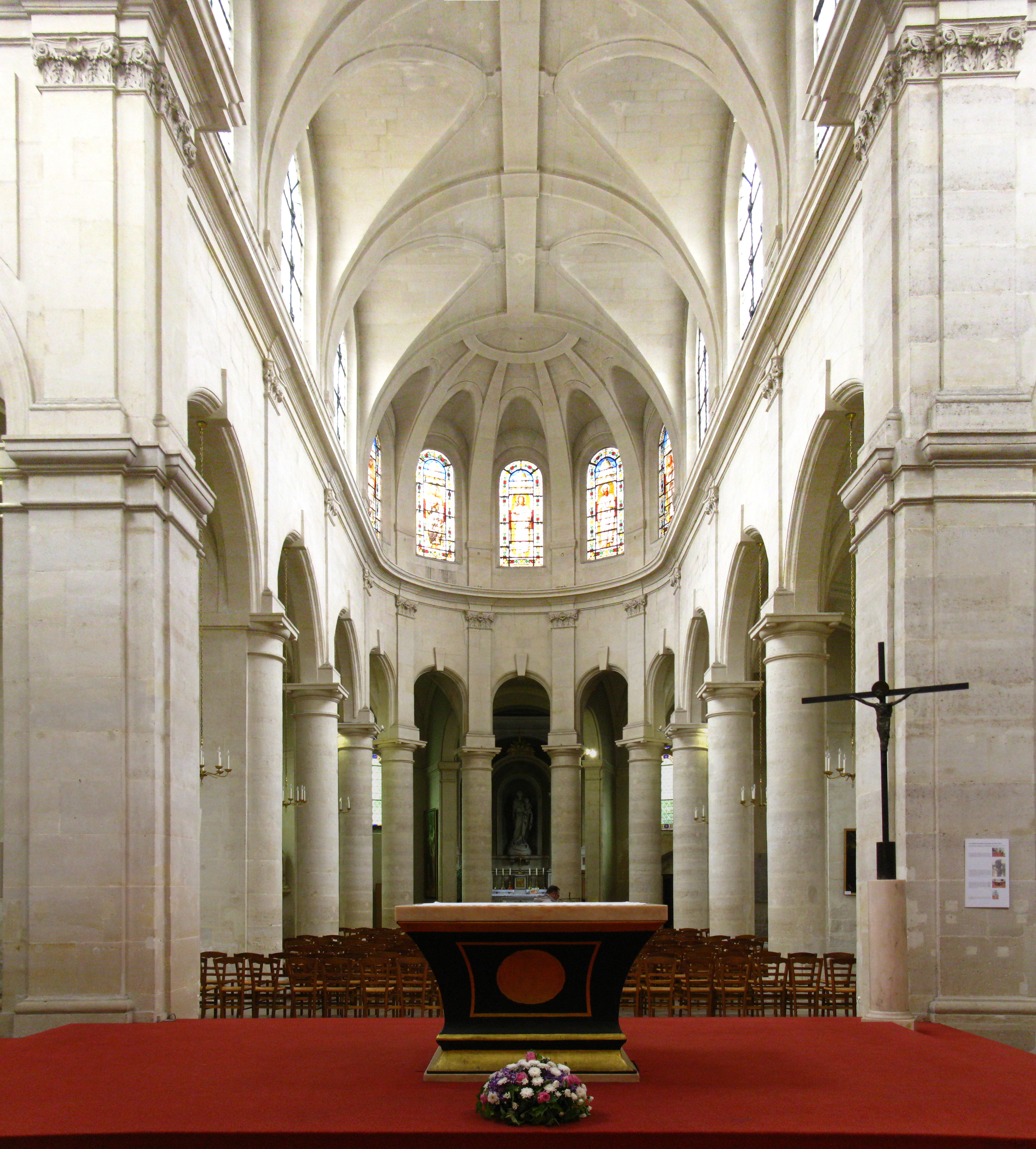 Vue intérieure de l'église Saint-Jacques-du-Haut-Pas .